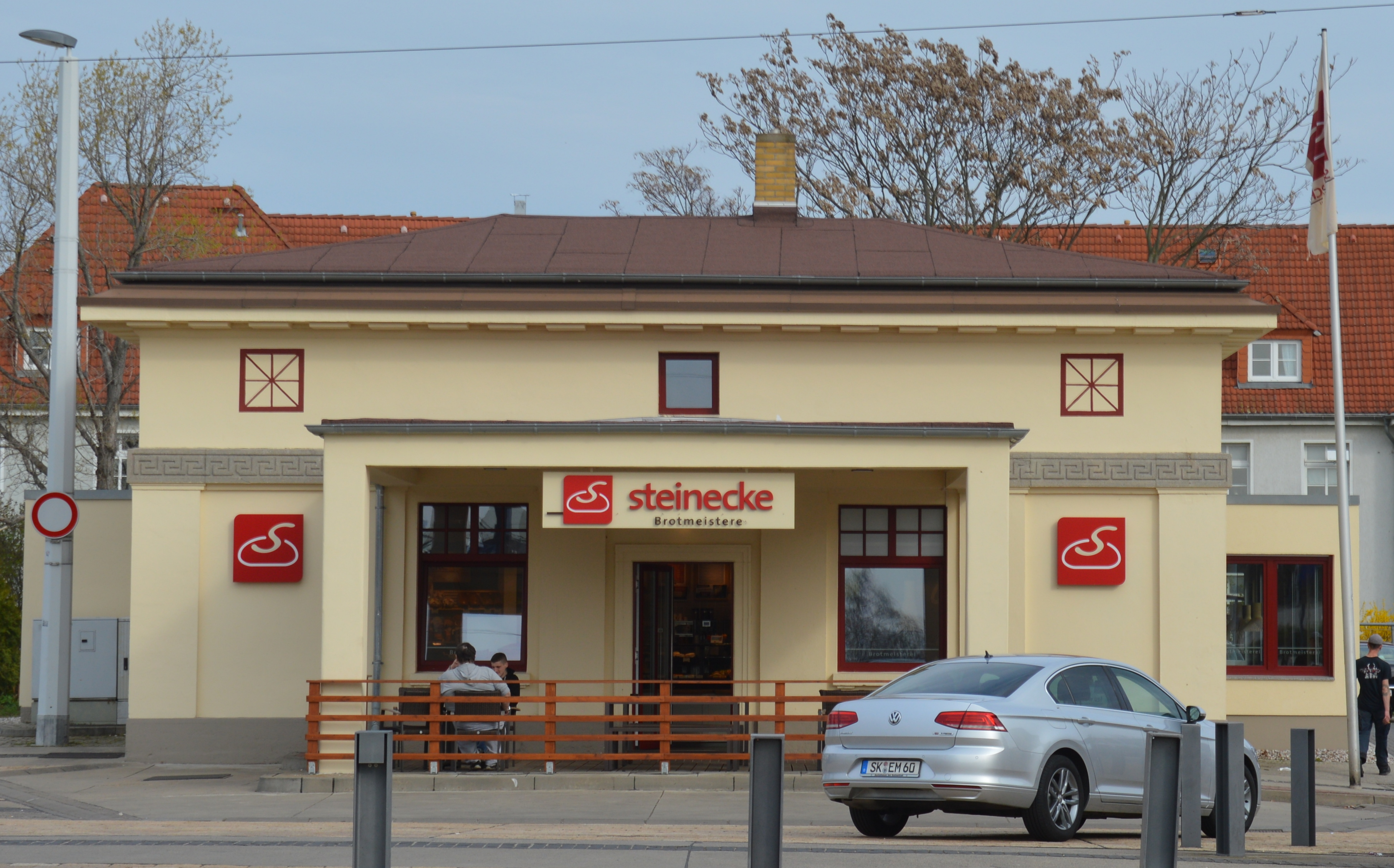 Tankstelle Leuna, mit Filiale Brotmeisterei Steinecke.